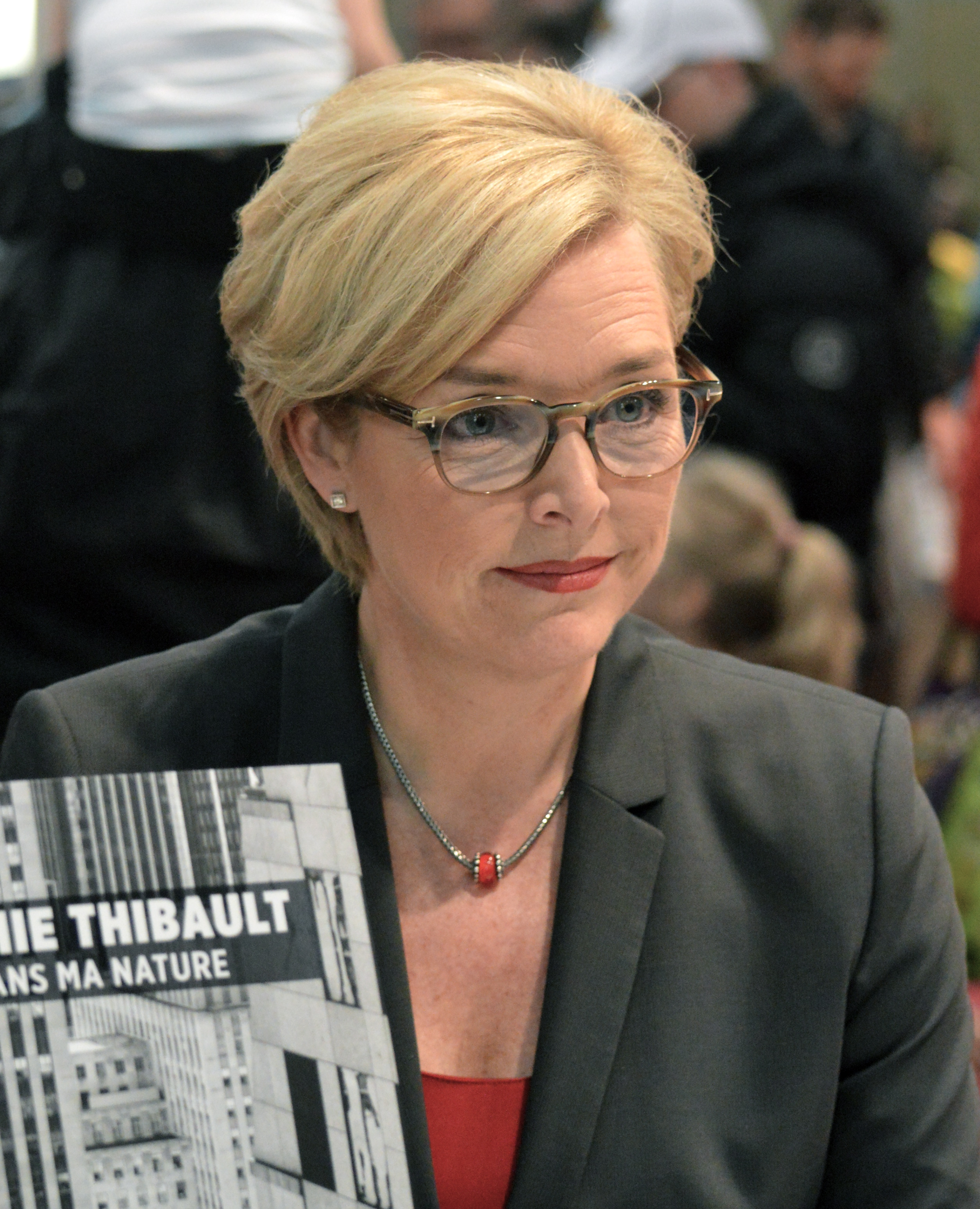 Sophie Thibault au Salon international du livre de Québec 2017